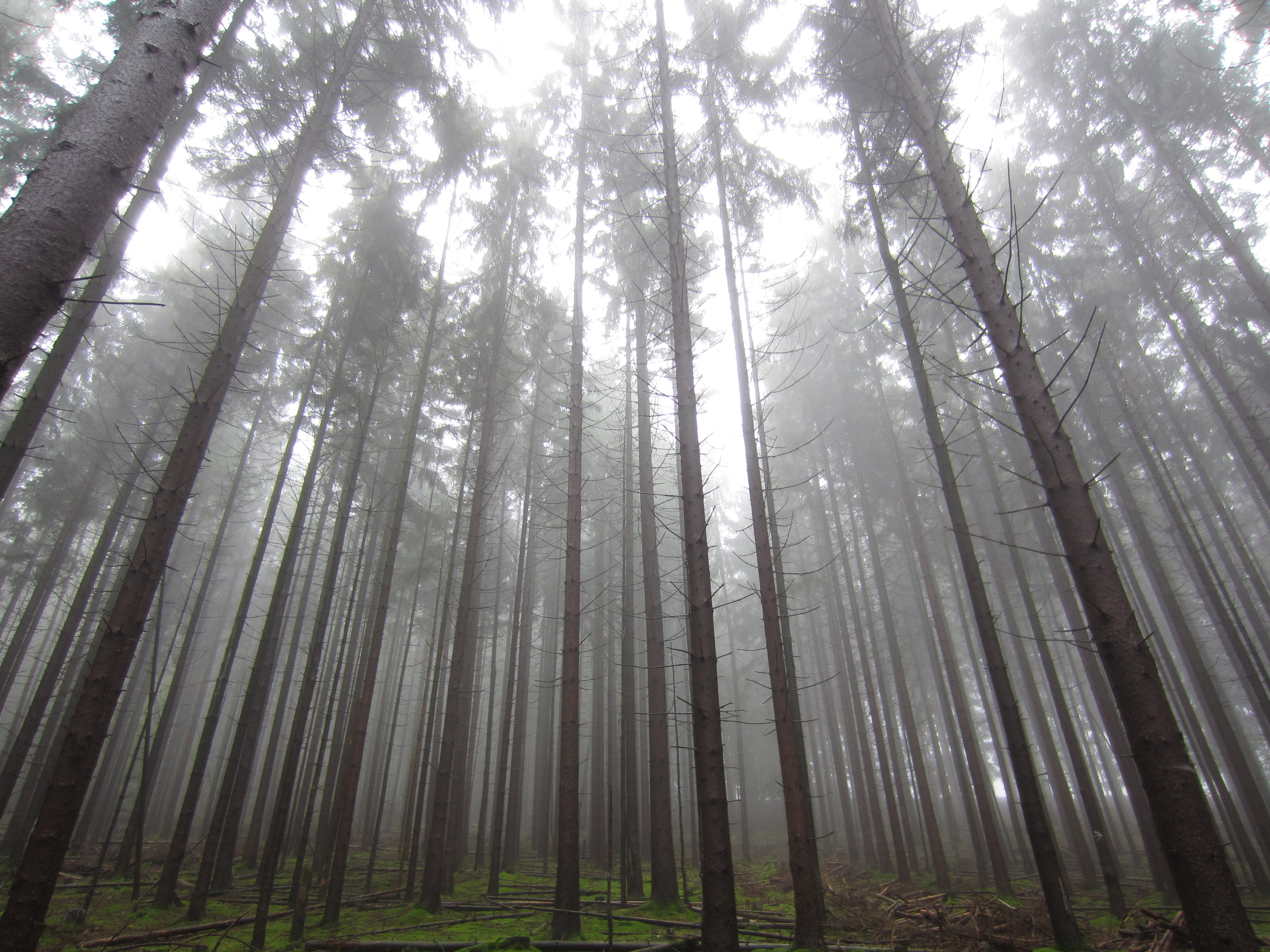 Herbststimmung im Wald.